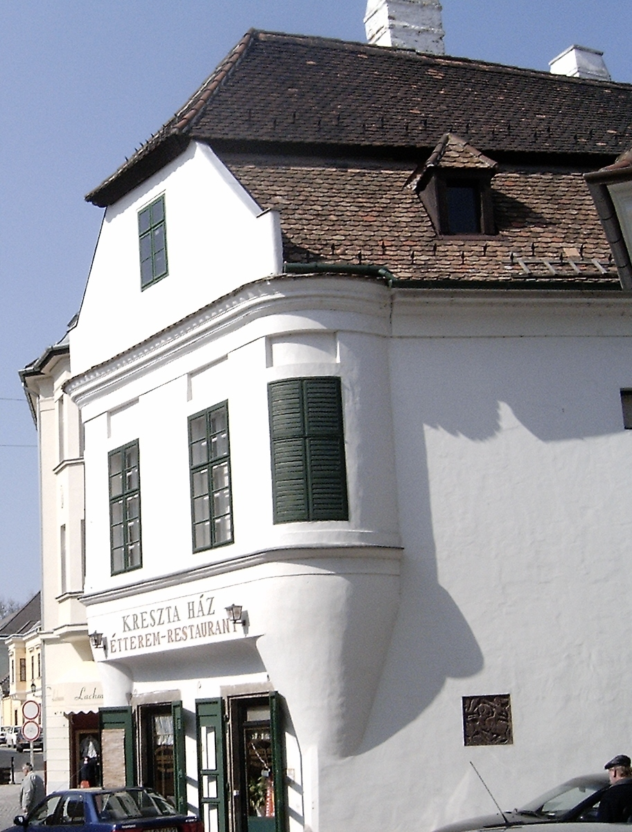 A győri Kreszta-ház (Győr-Moson-Sopron megye)